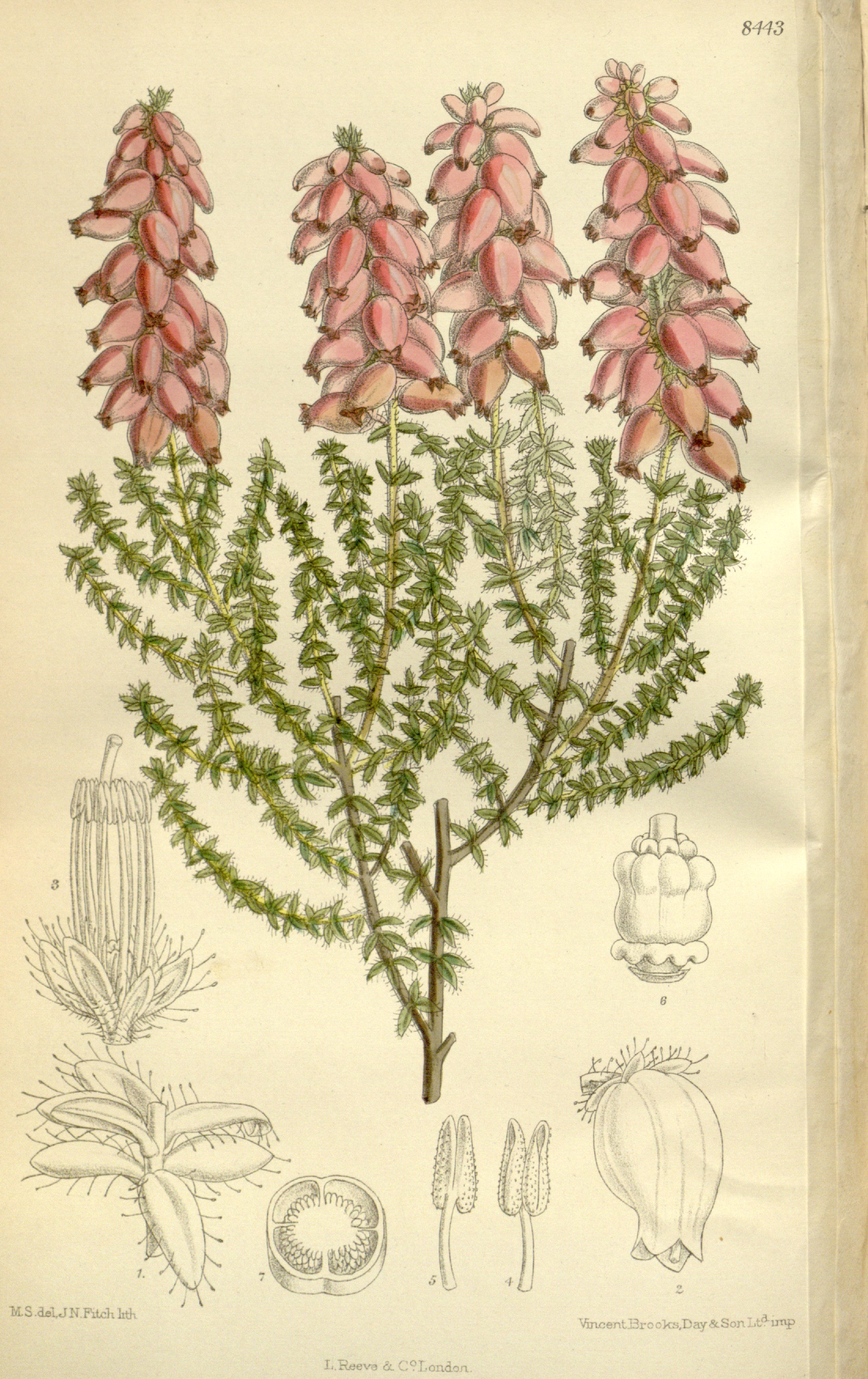 Erica ciliaris, Ericaceae